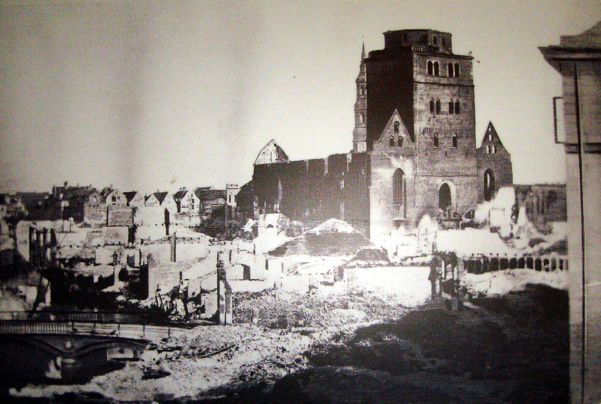 Daguerreotypie der zerstörten alten Nikolaikirche in Hamburg nach dem großen Brand 1842.